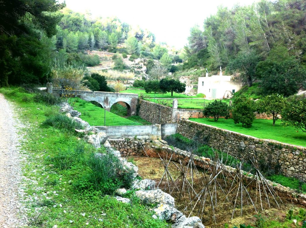 Wasserbauwerke treppenförmig